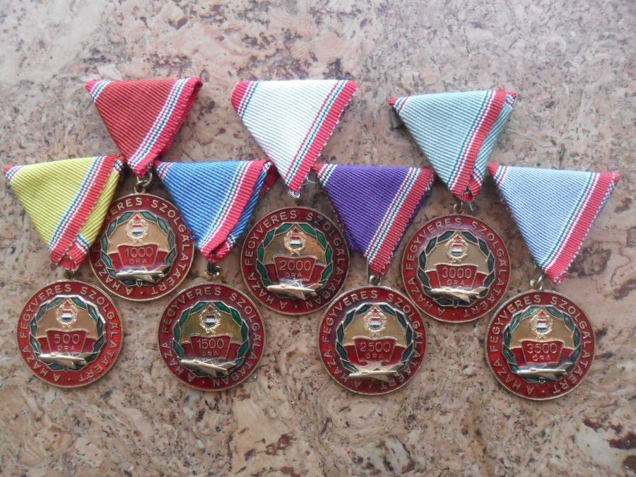 A haza fegyveres szolgálatáért, repült órák után járó érdemérem